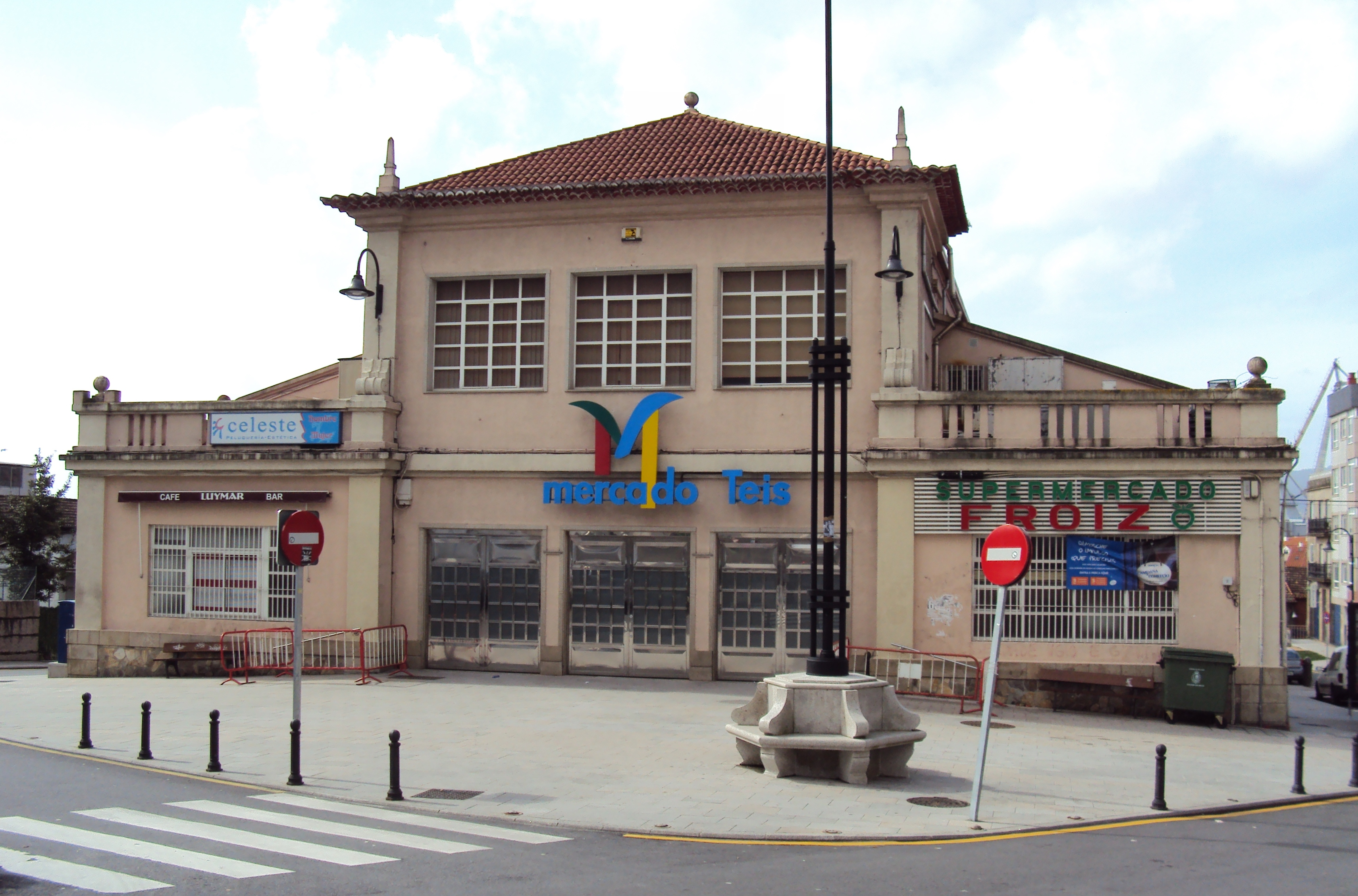 praza de abastos de Teis, Vigo